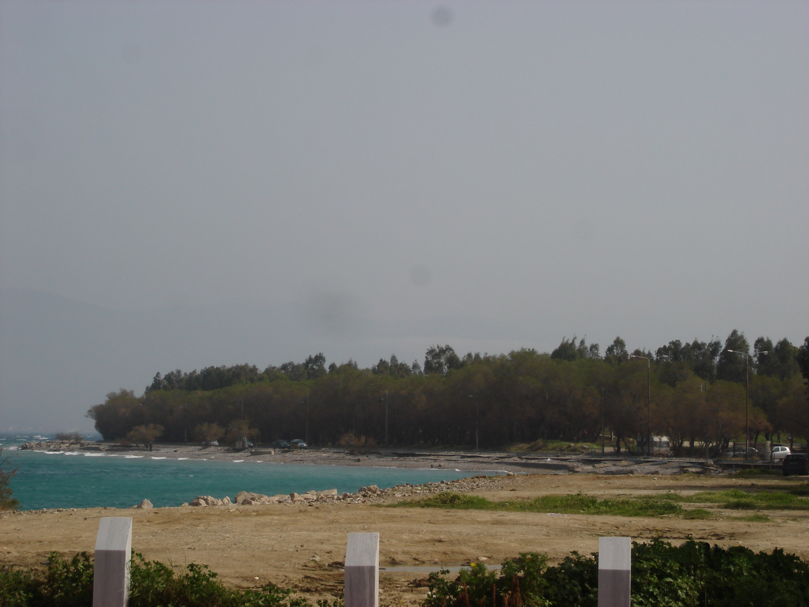 Agyia cape in patras GreecceΑγυιά , ακρωτήριο, έλος και συνοικία της Πάτρας